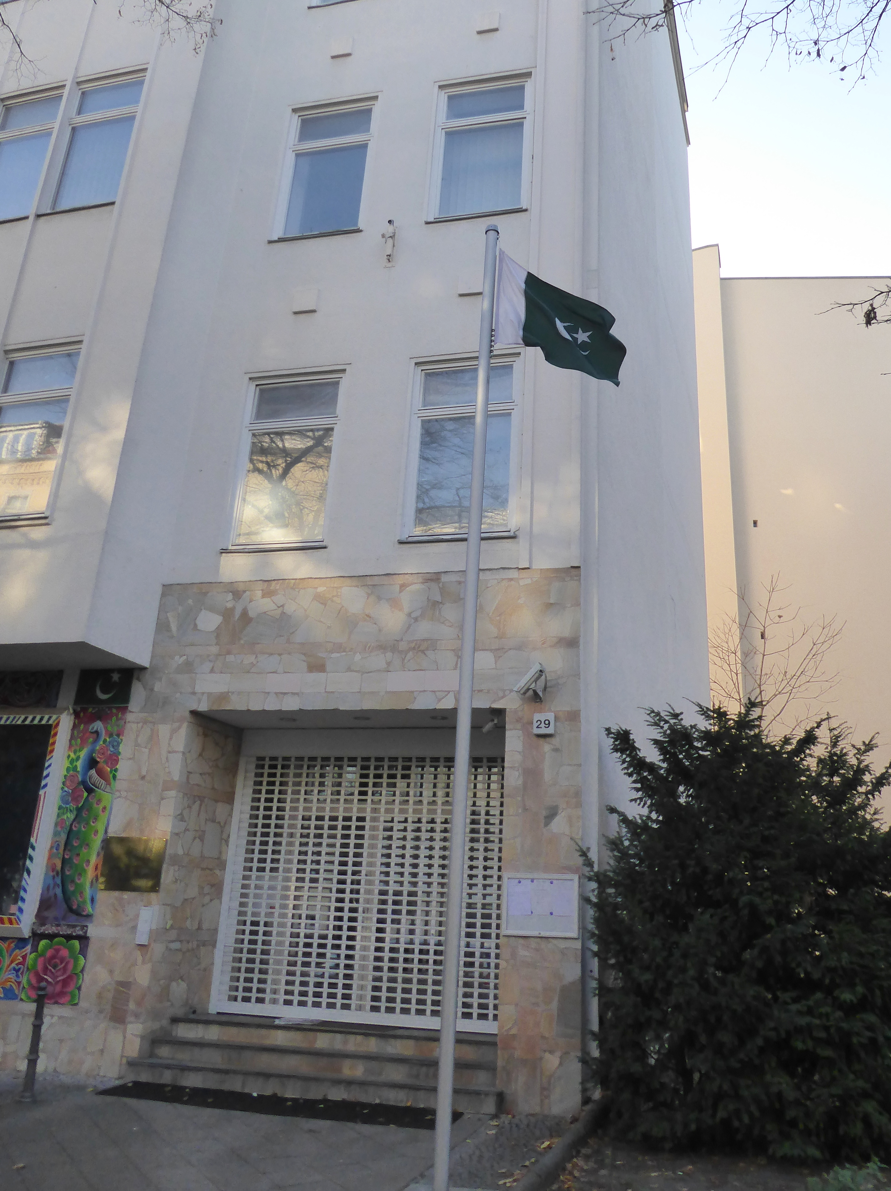 Wilmersdorf Schaperstraße Pakistanische Botschaft